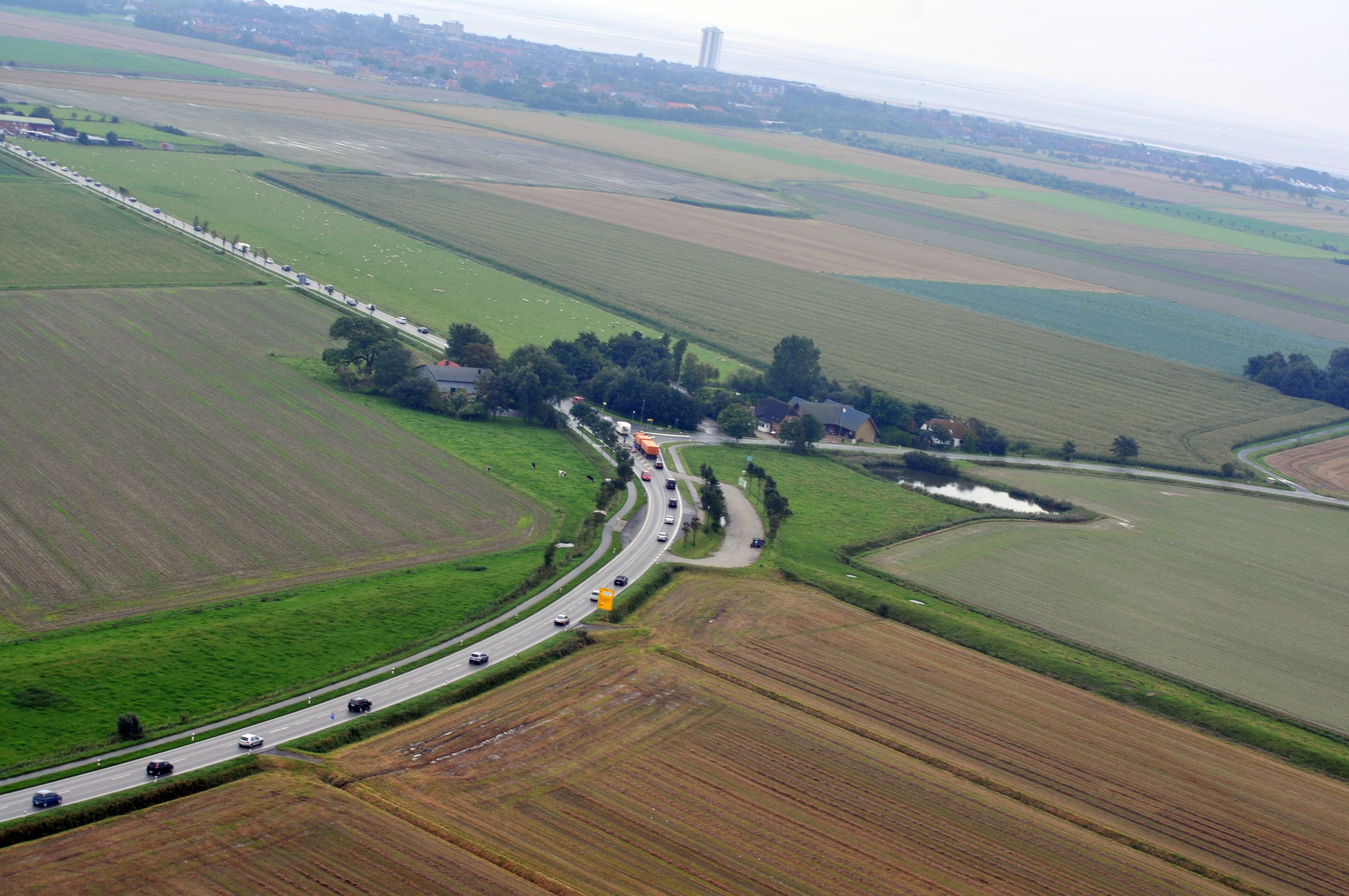 Fotoflug 4. Sept. 2011; Bundesstraße 203, Westerdeichstrich, Kreis Dithmarschen, Schleswig-Holstein, Deutschland; Büsum mit dem Hochhaus und die Nordseeküste im Hintergrund Dieses Foto entstand aufgrund eines Projektes, das von Wikimedia Deutschland e. V. gefördert wurde. Im Rahmen des „Community-Projektbudgets“ sollen Luftbilder u.a. von Inseln, Halligen, Sanden und Küstenorten der deutschen Nordseeküste angefertigt werden. Das Projekt „Fotoflüge“ wurde im September 2011 begonnen.